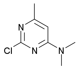 Crimidine